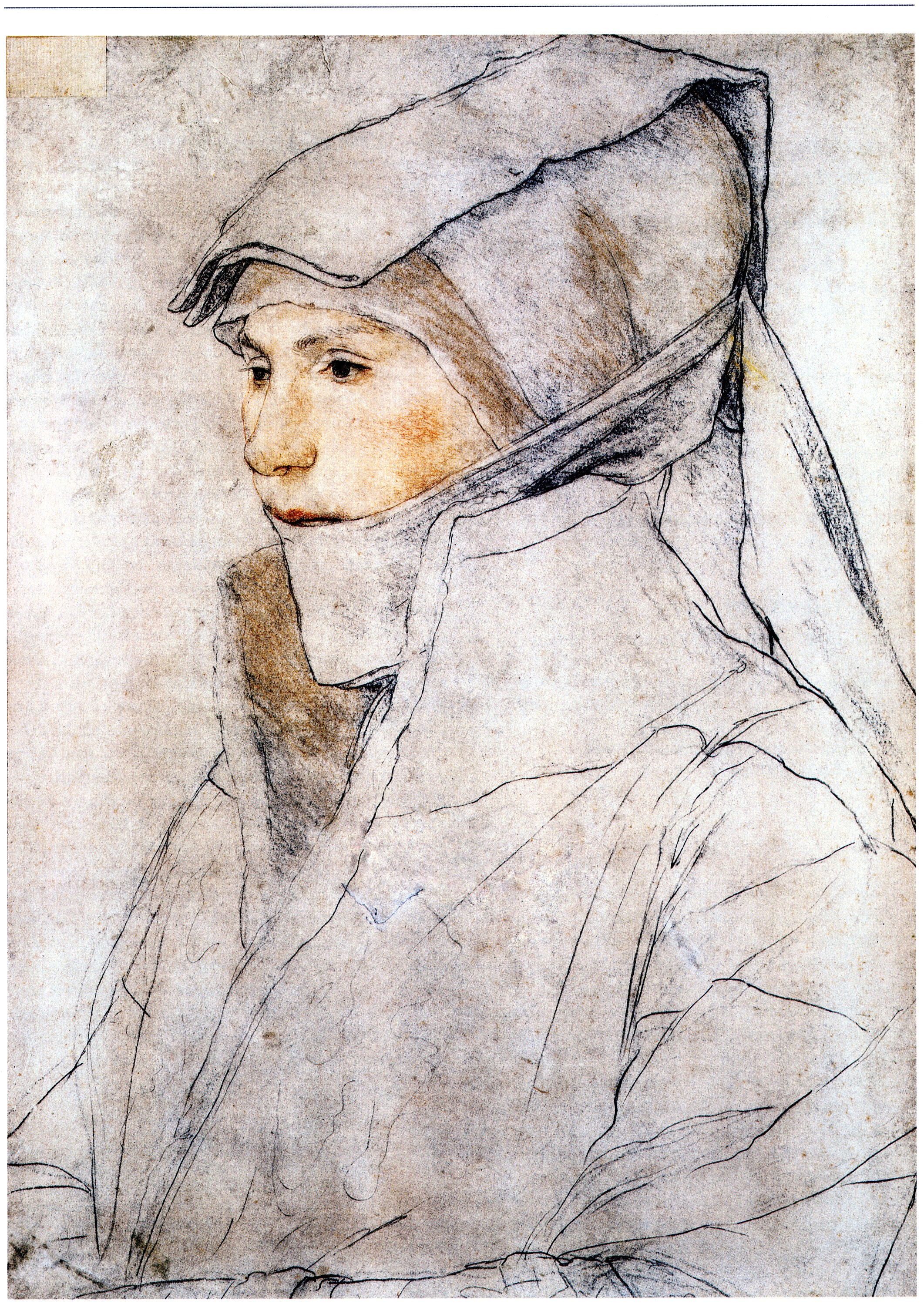 Studie zur Damstädter Madonna